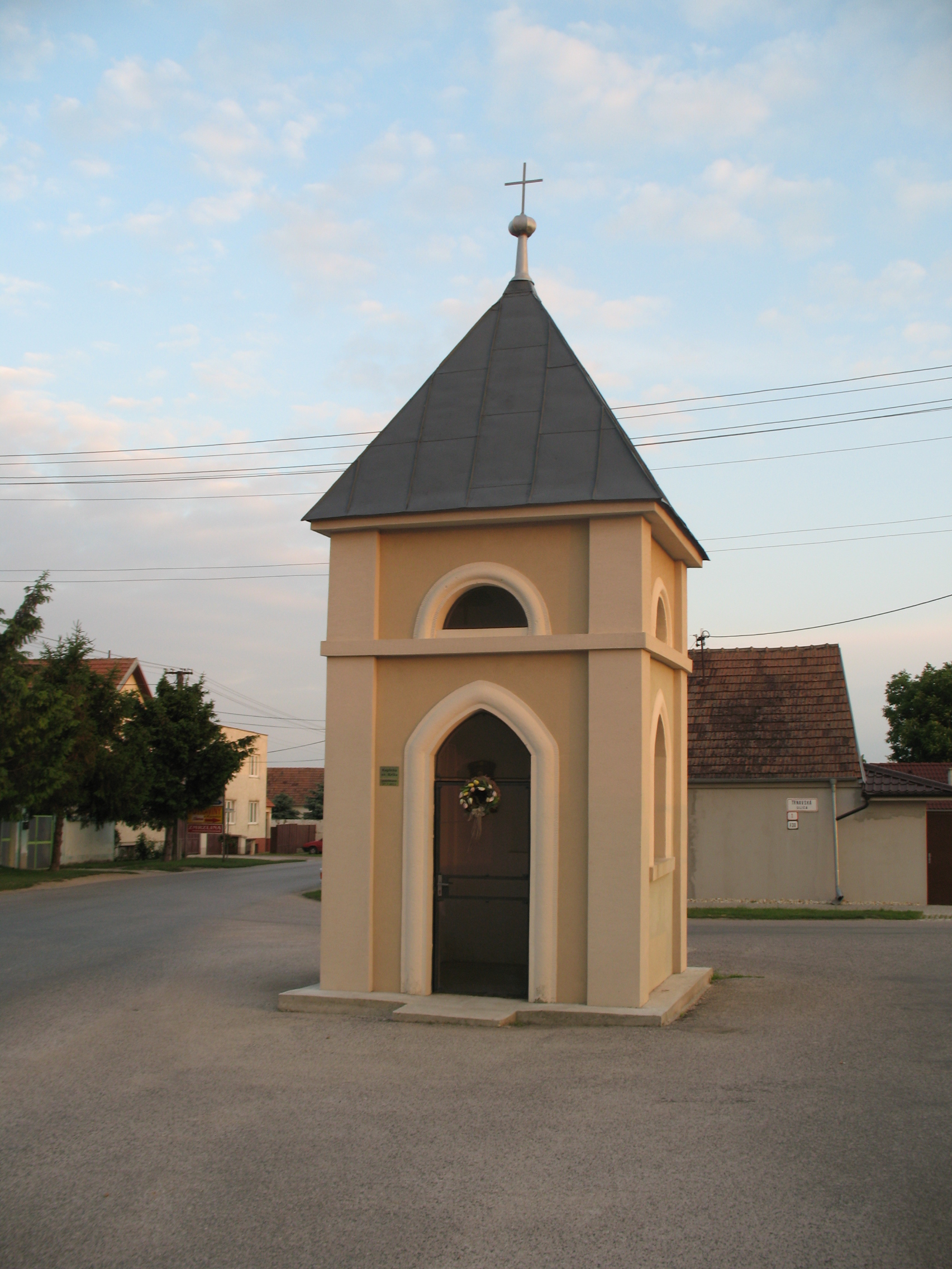 Alsólóc káp